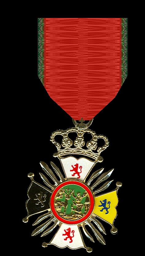 Ordeteken in mijn eigen verzameling. Eigen scan.